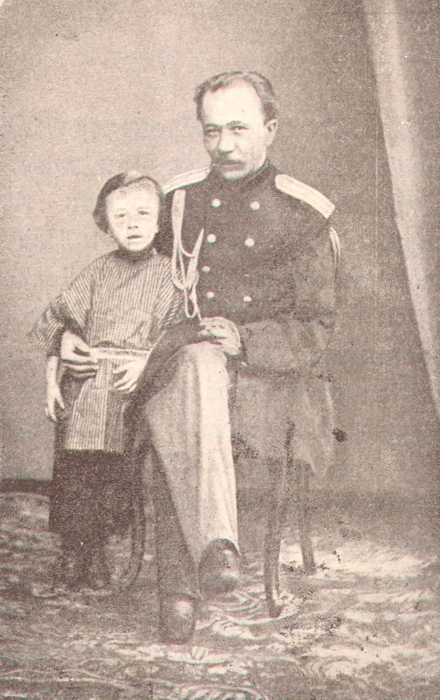 А. Н. Краснов в ранние детские годы с отцом.